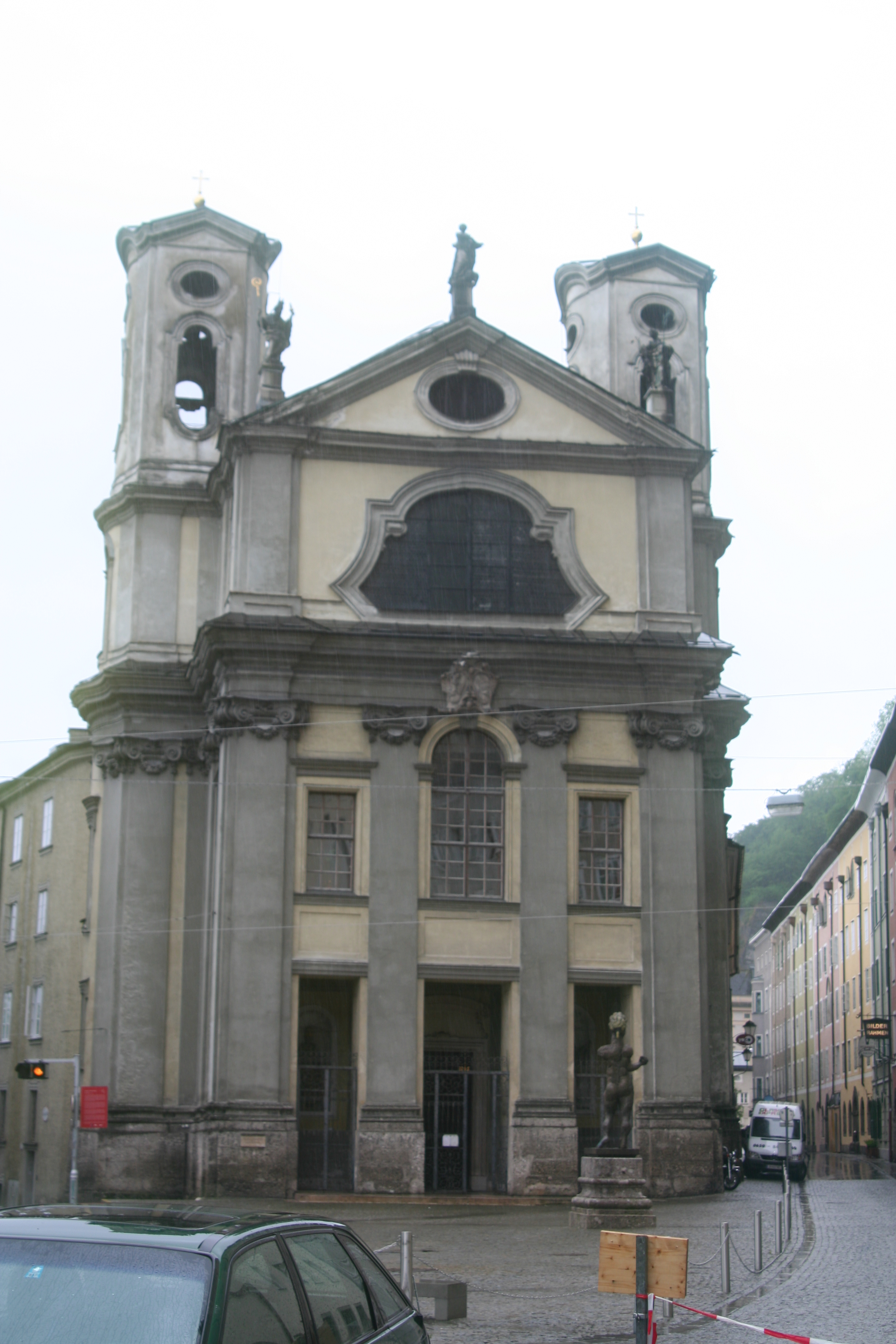 Markuskirche, Ursulinenplatz, Salzburg